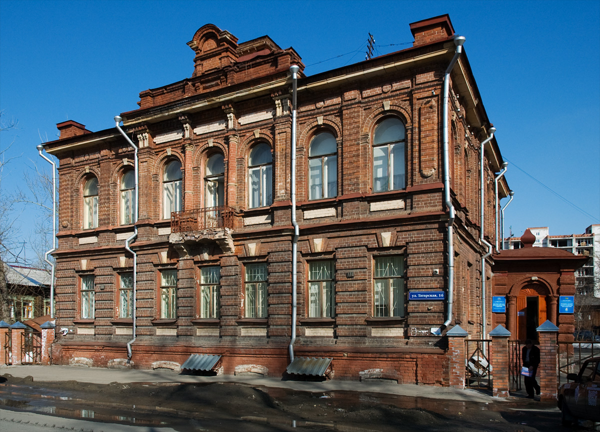 Татарская ул., д. 16